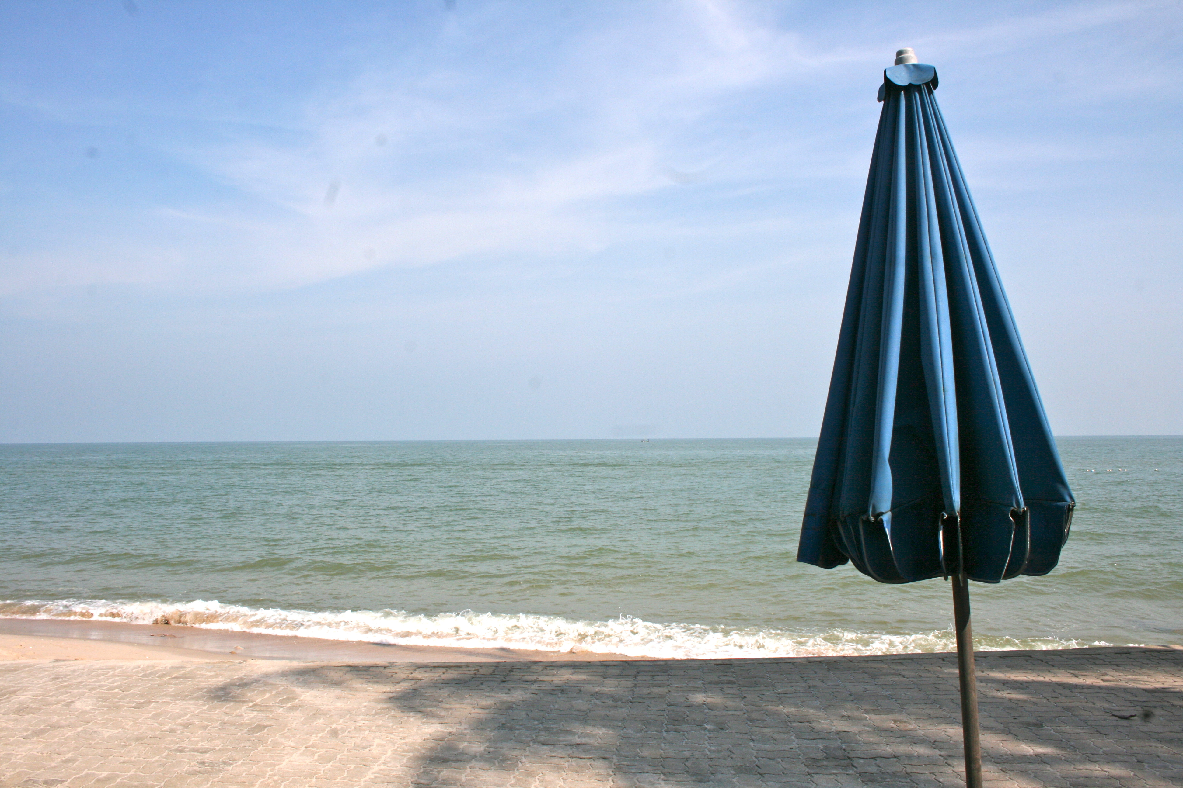 Folded sun umbrella